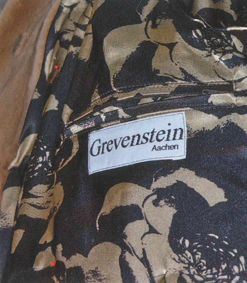 Einarbeiten einer Reißverschlussinnentasche in einen Pelz, mit Webetikett. Firma Grevenstein, Mode in Pelz & Leder, Aachen, Theaterstraße 15. Geschäftsaufgabe März 2016.